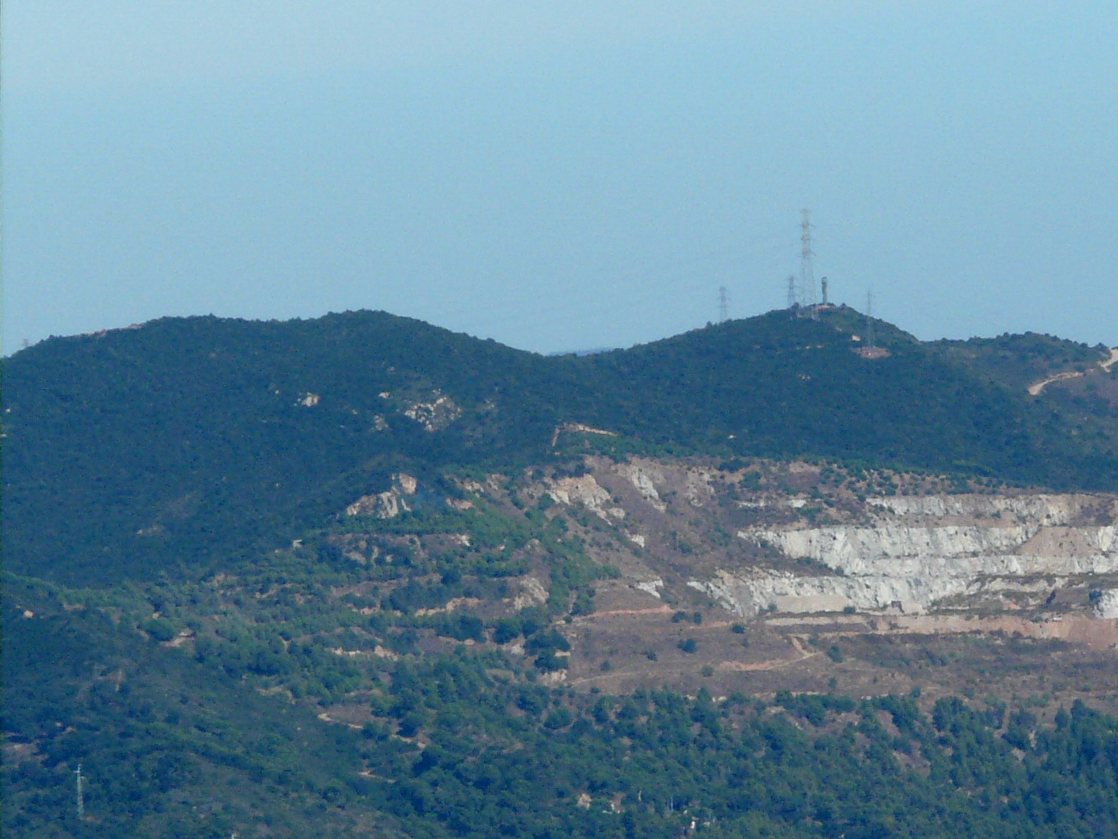 Les Corones i el Pi Candeler (a l'esquerra, molt junts), la Coscollada (a la dreta, amb una torre de vigilància contra incendis) i la pedrera de la Vallençana, vistos des de prop del turó de Santa Maria, a Collserola.